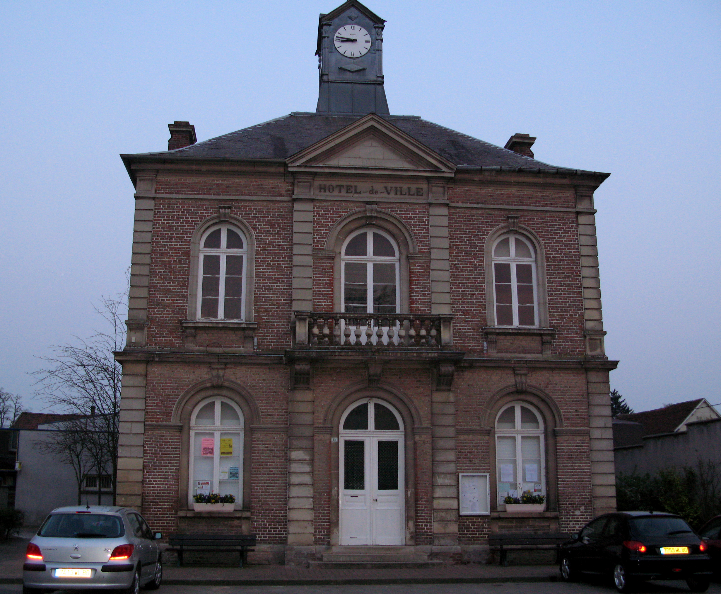 Molliens-Dreuil (Somme, France)